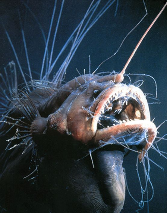 Caulophryne pelagica (Brauer), 183 mm SL, BMNH 2000.1.14.106.